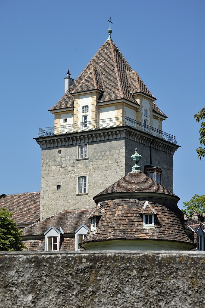 Schloß Leesdorf/Meisterschule des österr. Malerhandwerks